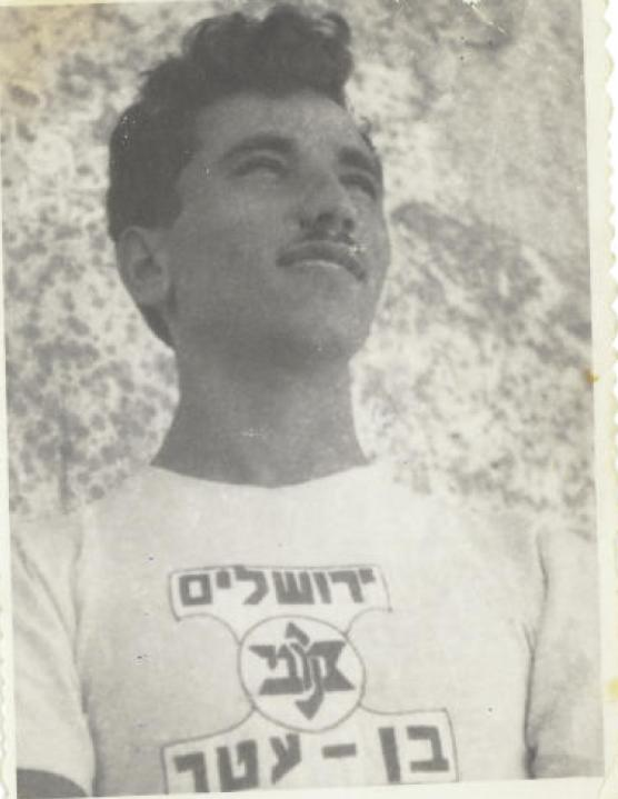 תמונה מארכיון של מנחם שירזי